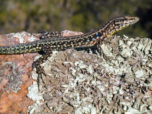 Podarcis tiliguerta (male), Corsica